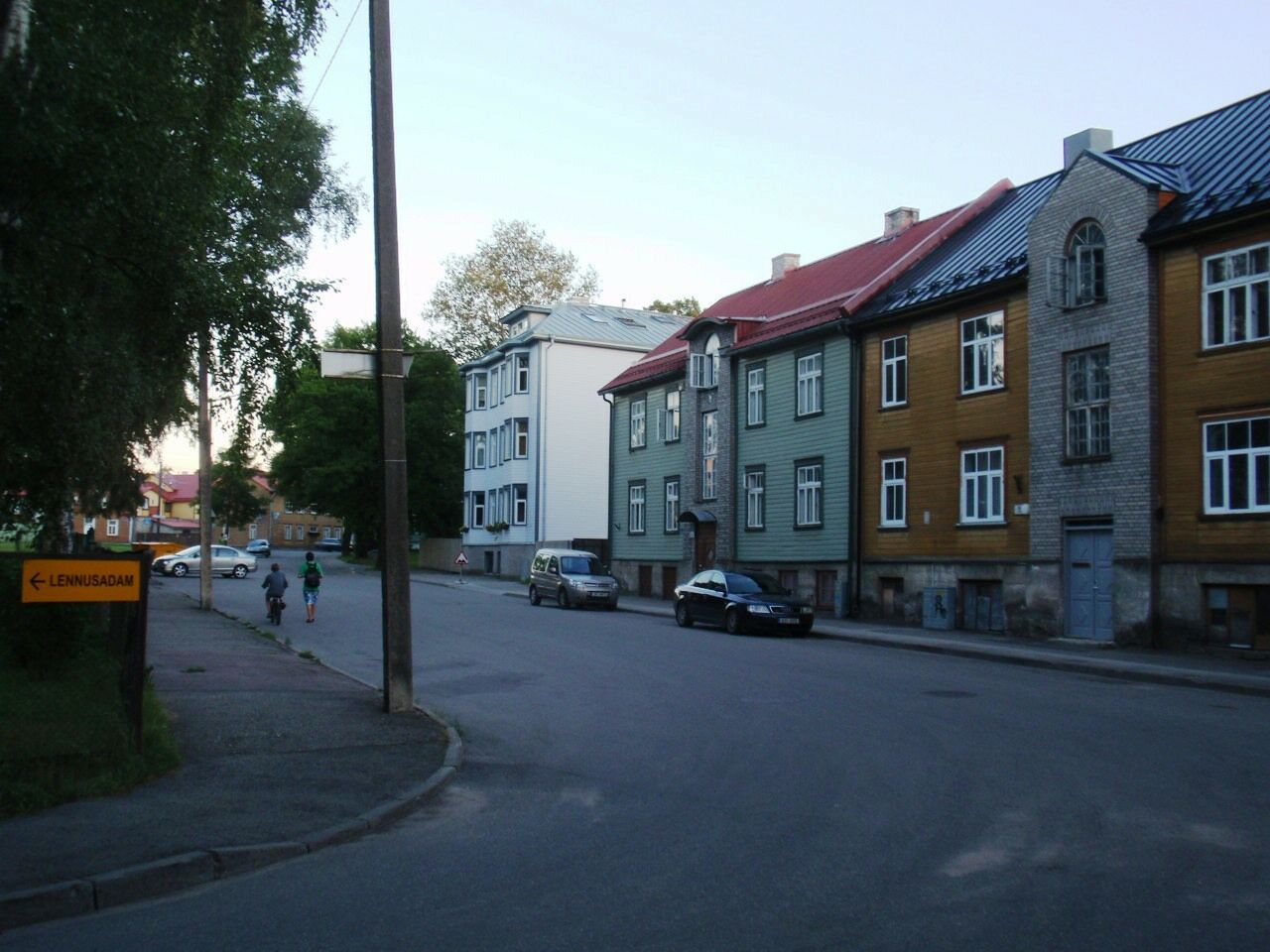 Uus-Kalamaja tänav Tallinnas Noole tänava nurgalt vaadatuna.